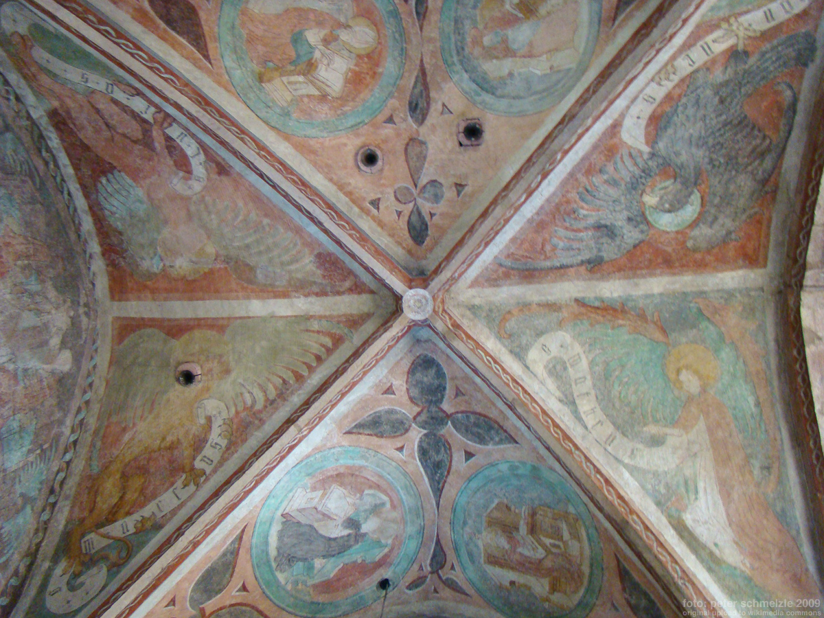 Deckenmalereien im Chor der Kilianskirche in Bretzfeld-Waldbach